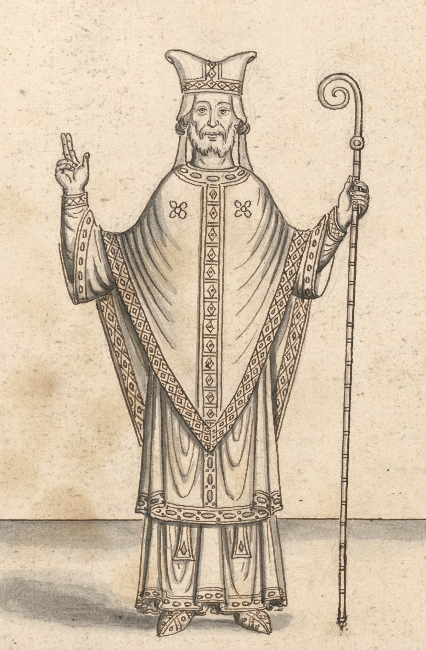 Dessin représentant Ulger, évêque d'Angers